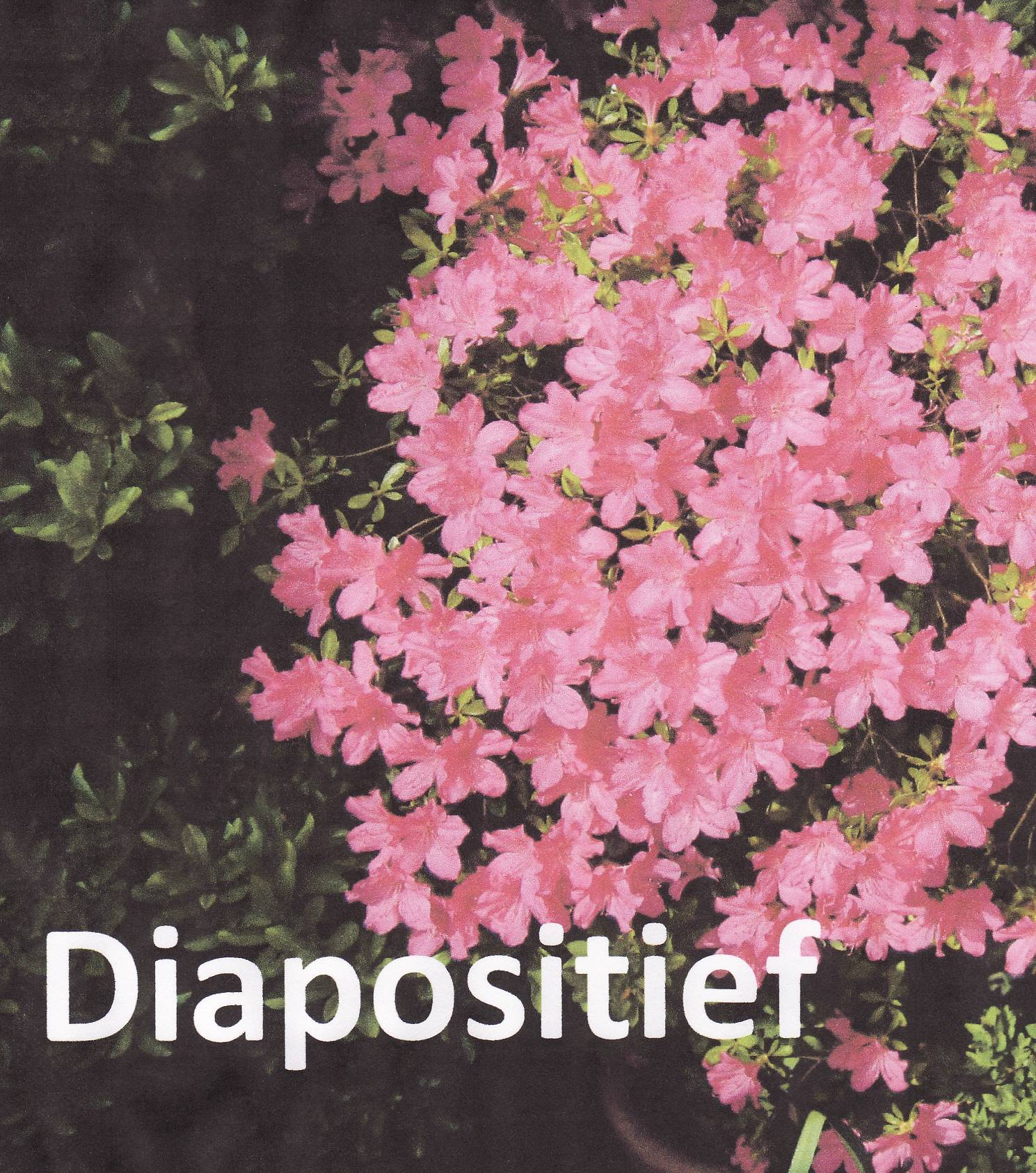 printing technique (example of white-letter printing)